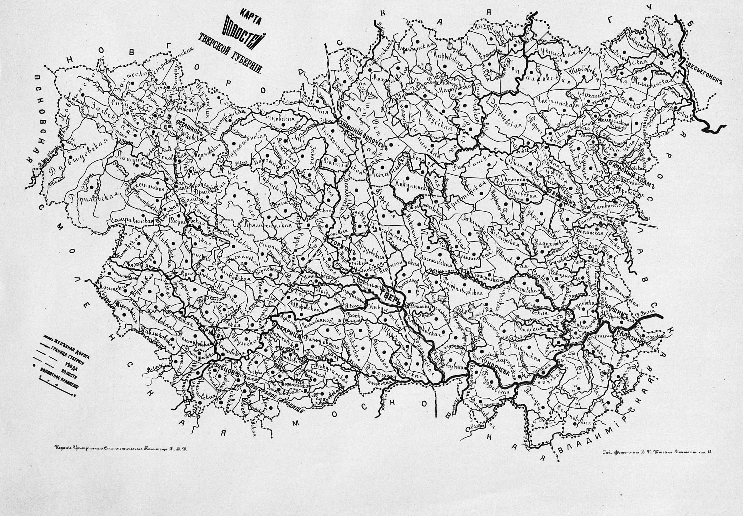 Карта волостей Тверской губернии